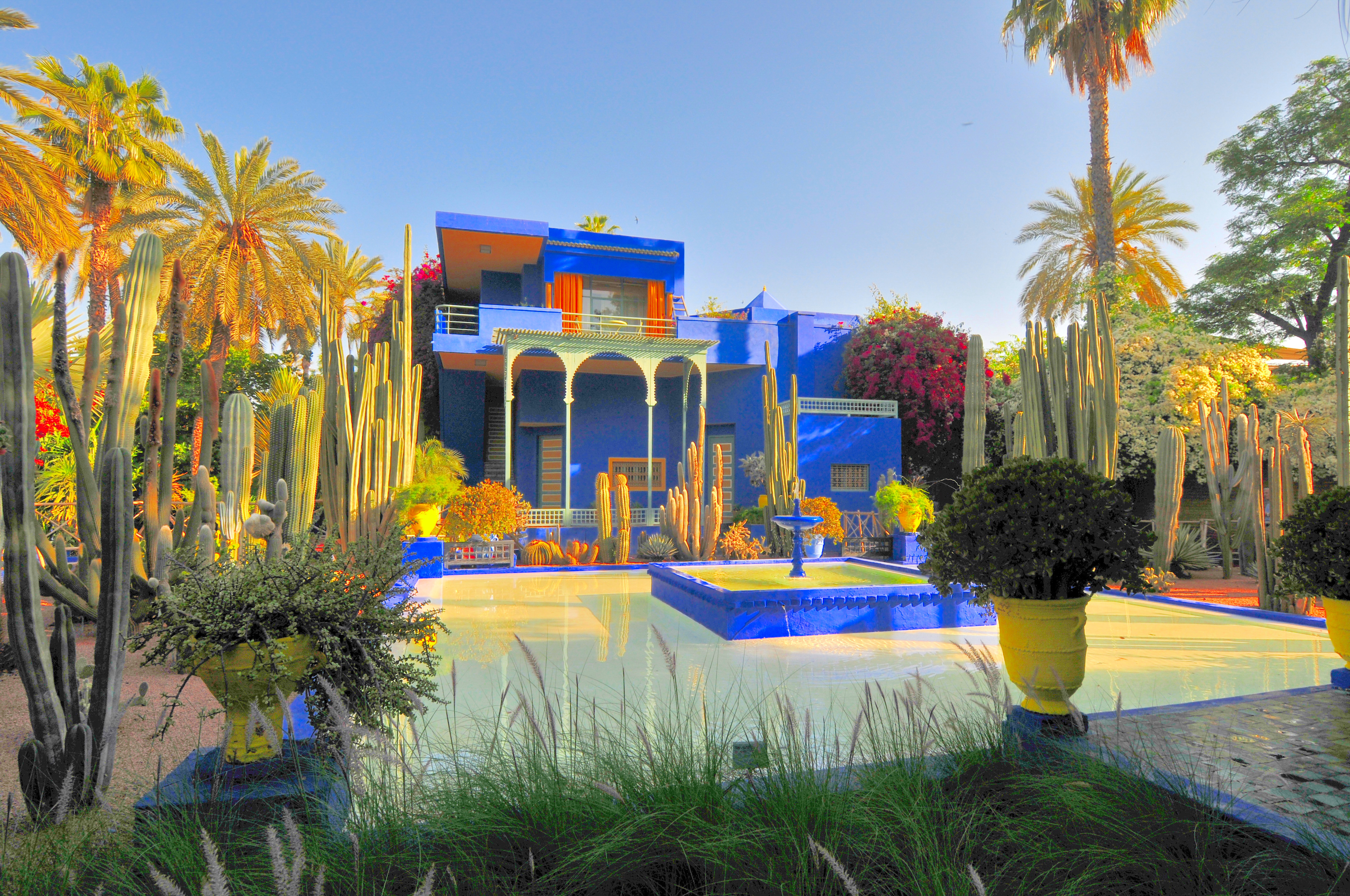 Le_jardin_des_majorelle_21.JPG Marrakch maroc